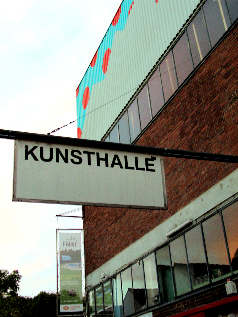 Die Kunsthalle Faust ist Teil des Kulturzentrums Faust in Hannover und findet sich in der denkmalgeschützten 60er-Jahre-Halle des Architekten Ernst Zinsser. Das 1998 zur Kunst- und Mehrzweckhalle eingerichtete Erste Obergeschoss mit seinen rund 360 m² wird mehrmals im Jahr für Ausstellungen genutzt ...